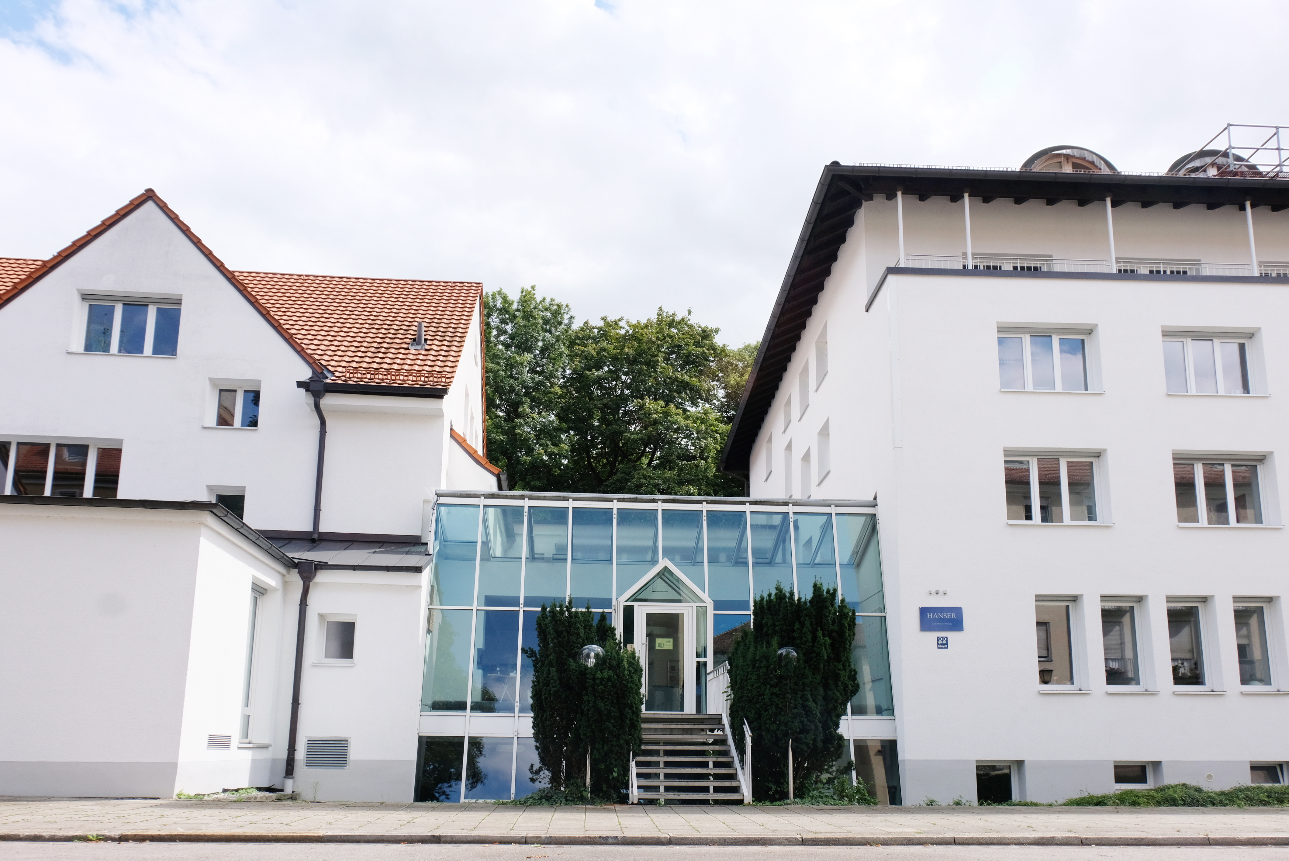 Sitz des Hanser Fachverlags in der Kolberger Straße, München-Bogenhausen (2020)